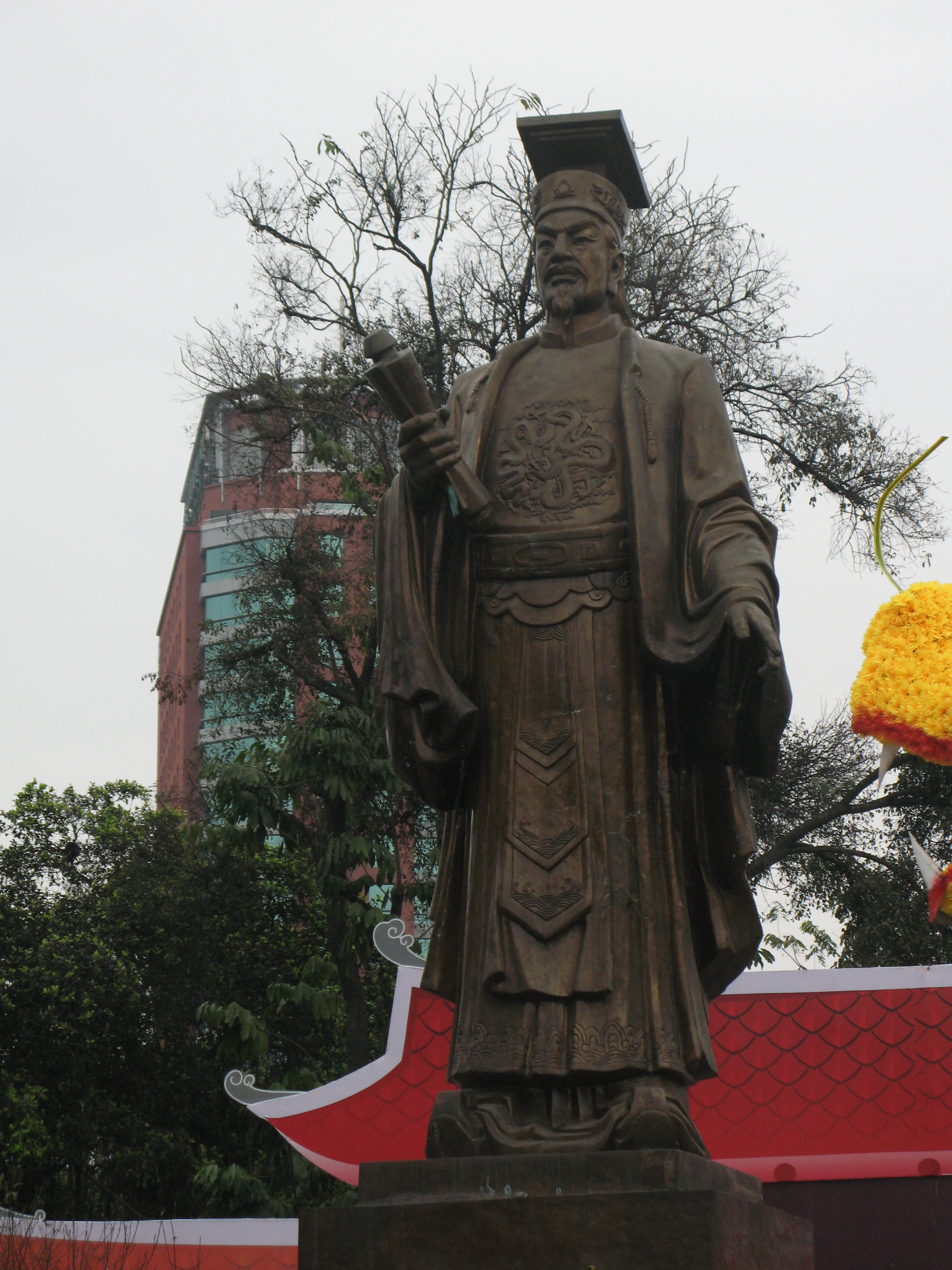 Tượng Lý Thái Tổ cạnh Hồ Hoàn Kiếm, Hà Nội